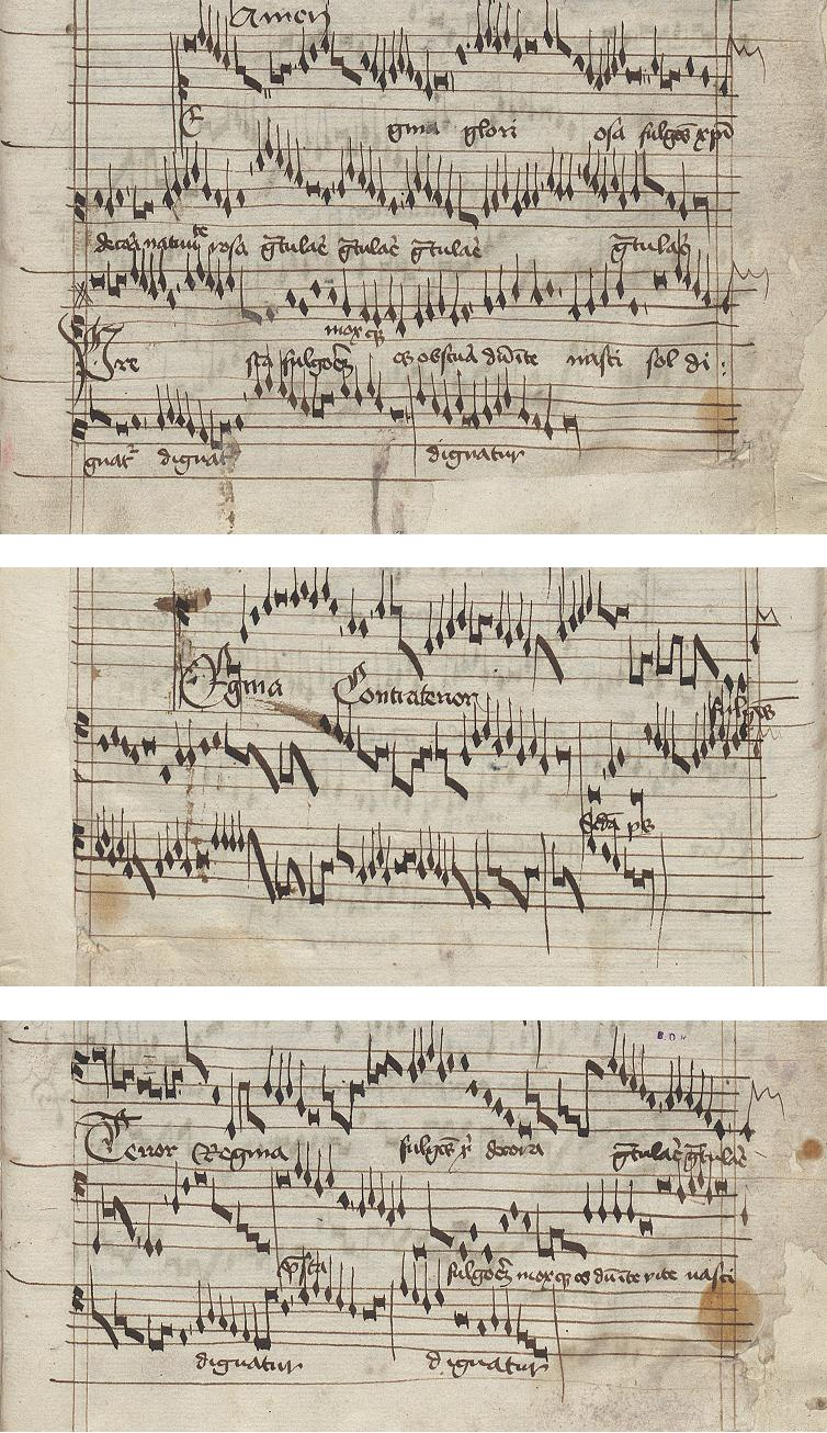 Warsaw, National Library III. 8054 (olim Krasinski 52)